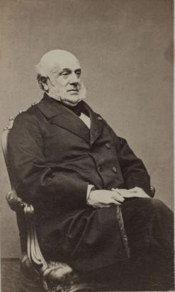 Portrait de Demetz Frédéric Auguste, (1796-1873), magistrat